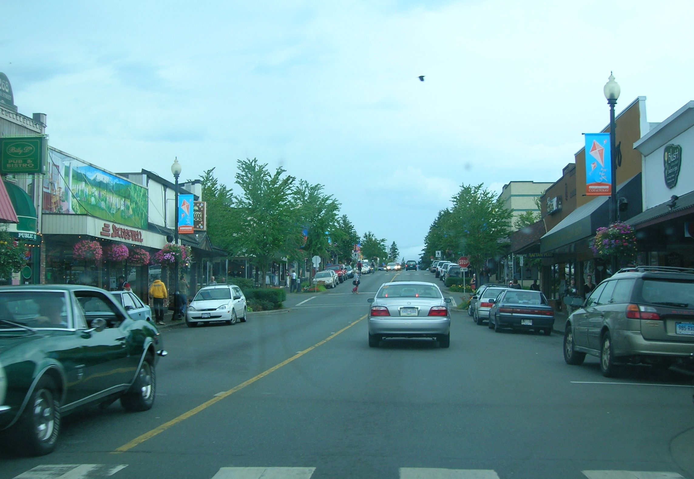 Downtown Courtenay /5th street